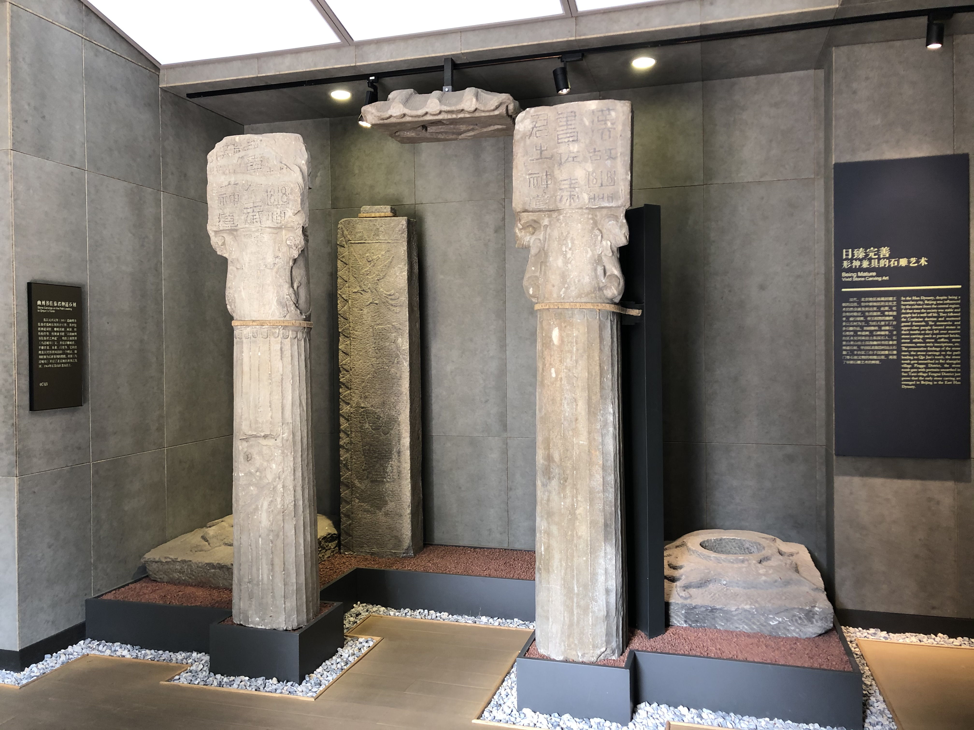 中文（台灣）: 漢故幽州書佐秦君石闕